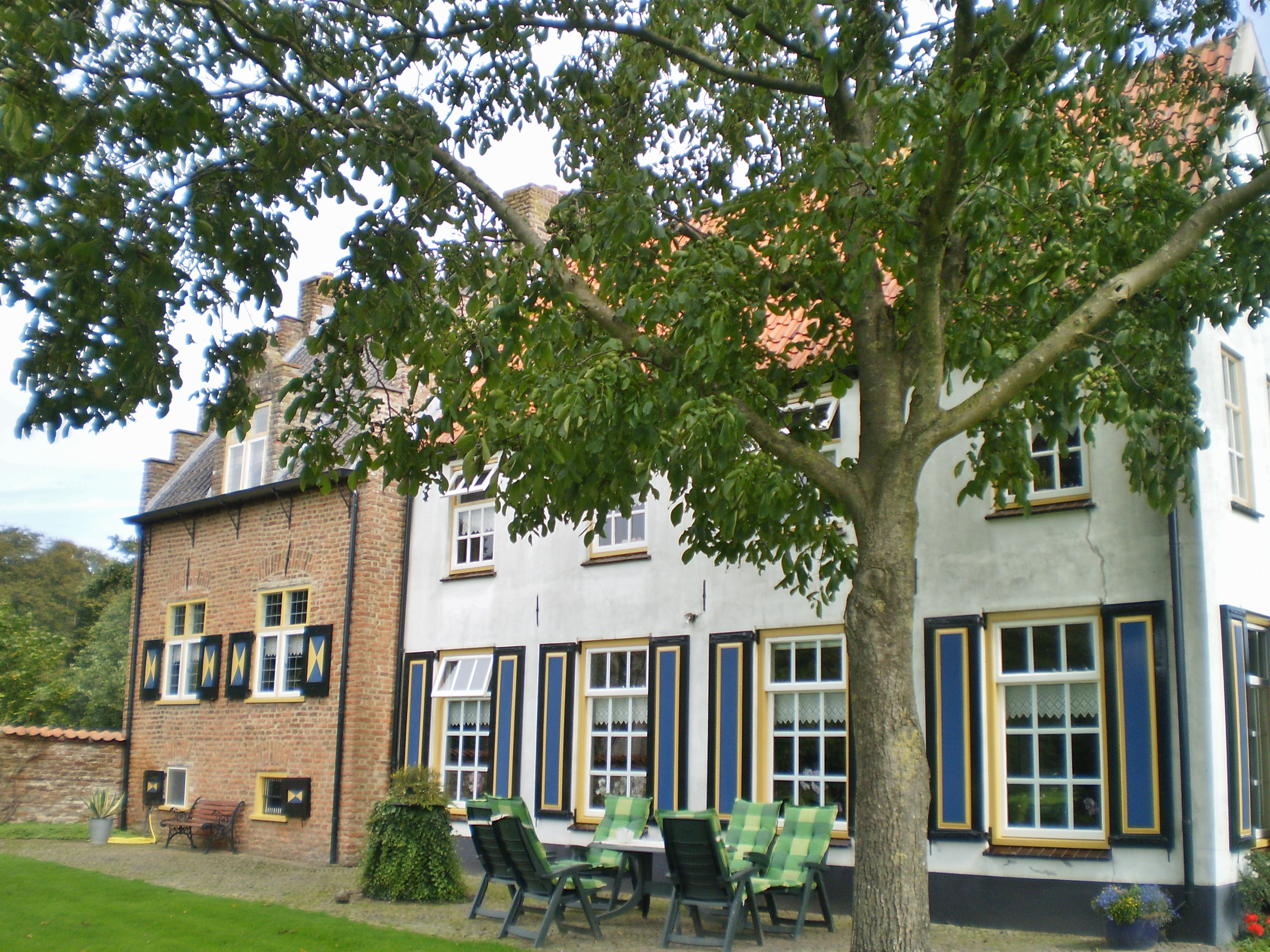 Schevichoven in Leersum 2011